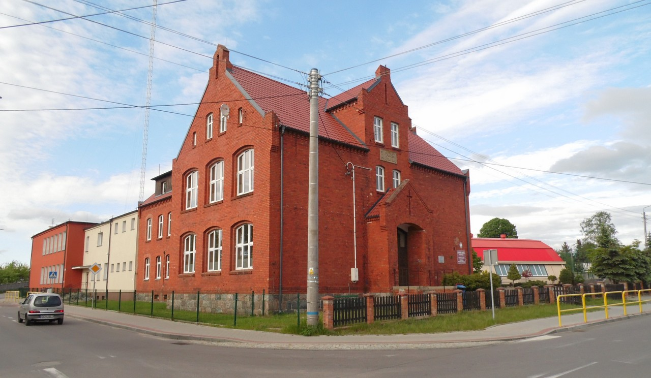 BUDYNEK SZKOŁY.